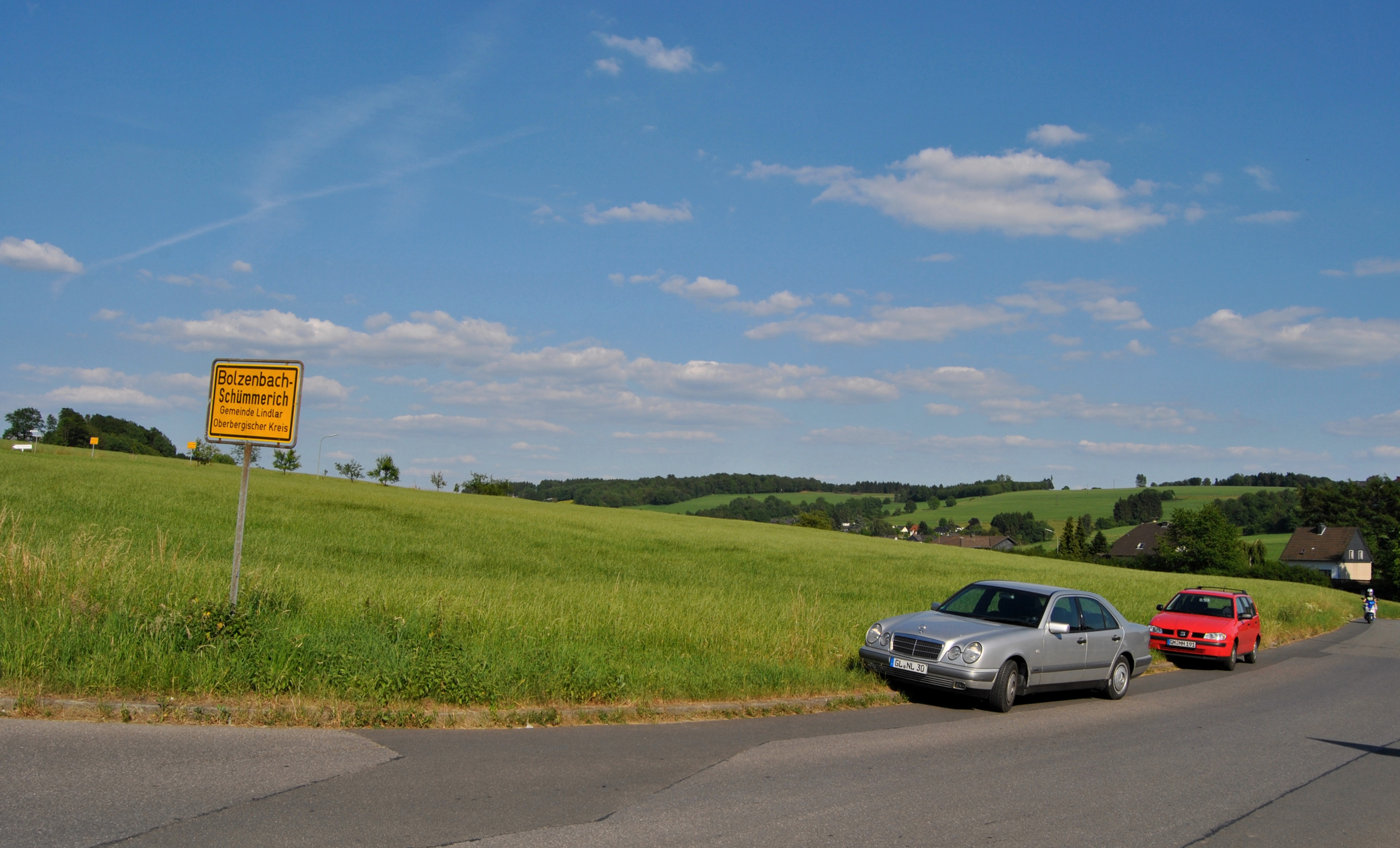 Landschaft am Ortseingangschild von Bolzenbach-Schümmerich, Lindlar.